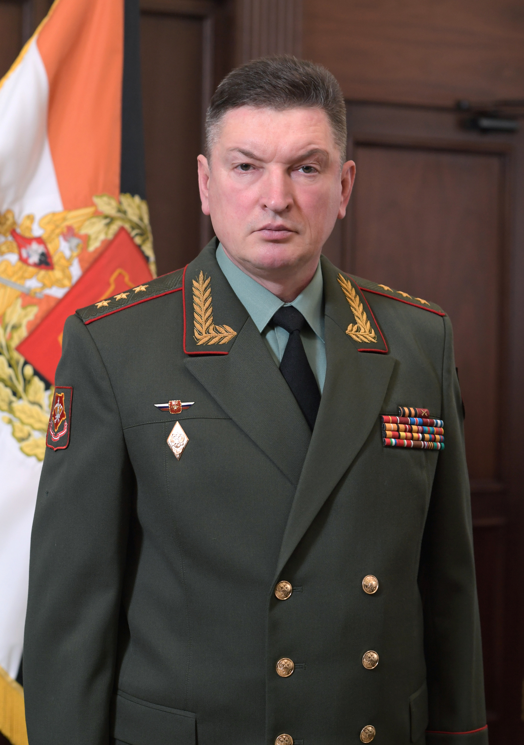 Александр Павлович Лапин — российский военачальник, генерал-полковник, командующий войсками Центрального военного округа.